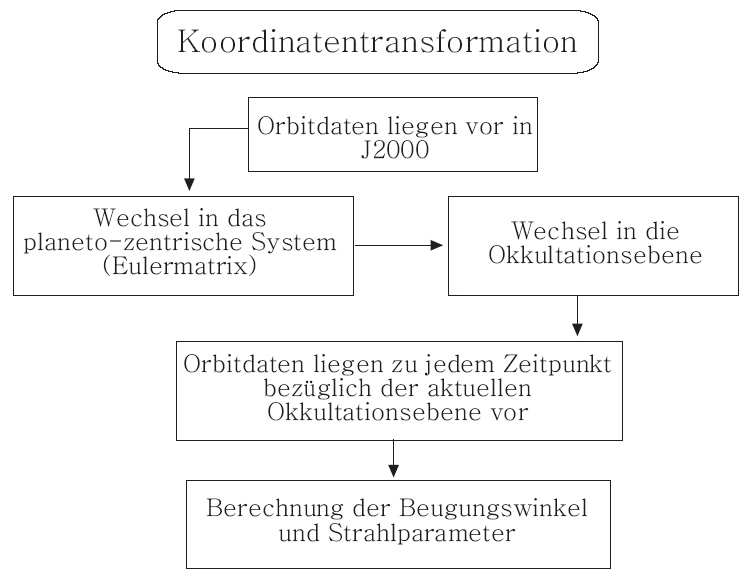 Zur Herleitung der Residuenfrequenz